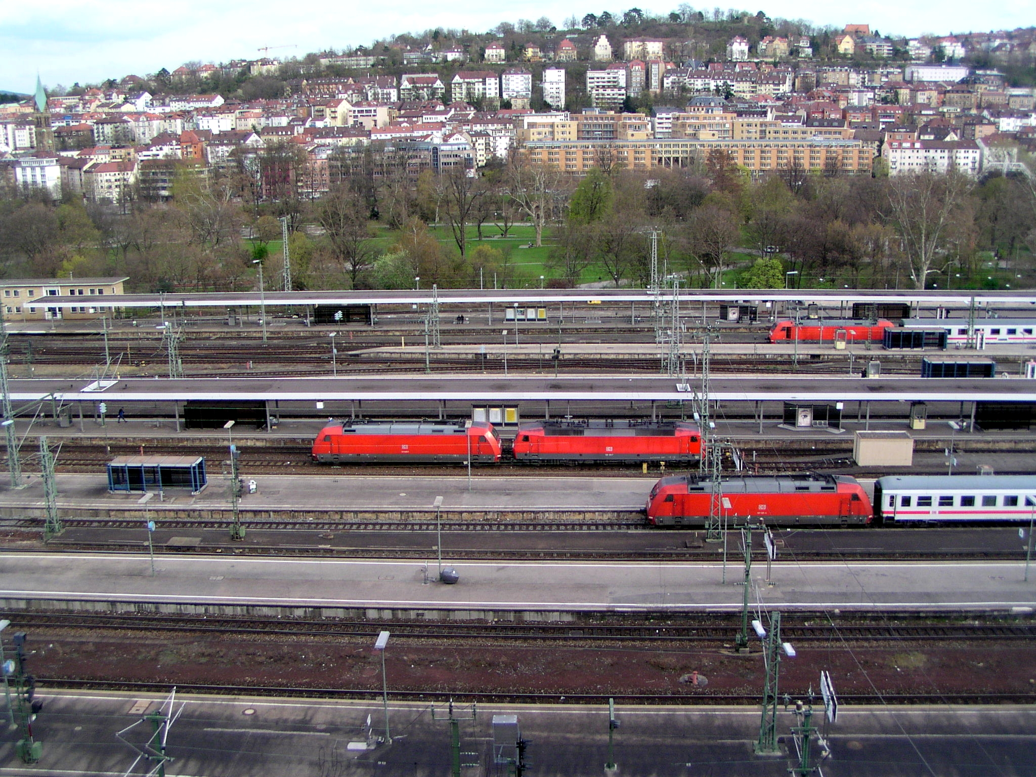 Blick auf die Gleisanlagen des Stuttgarter Hauptbahnhofs und den Stadtpark im März 2008